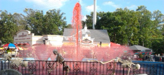 המזרקה בסיקס פלאגס גרייט אדוונצ'ר בזמן ההאלווין